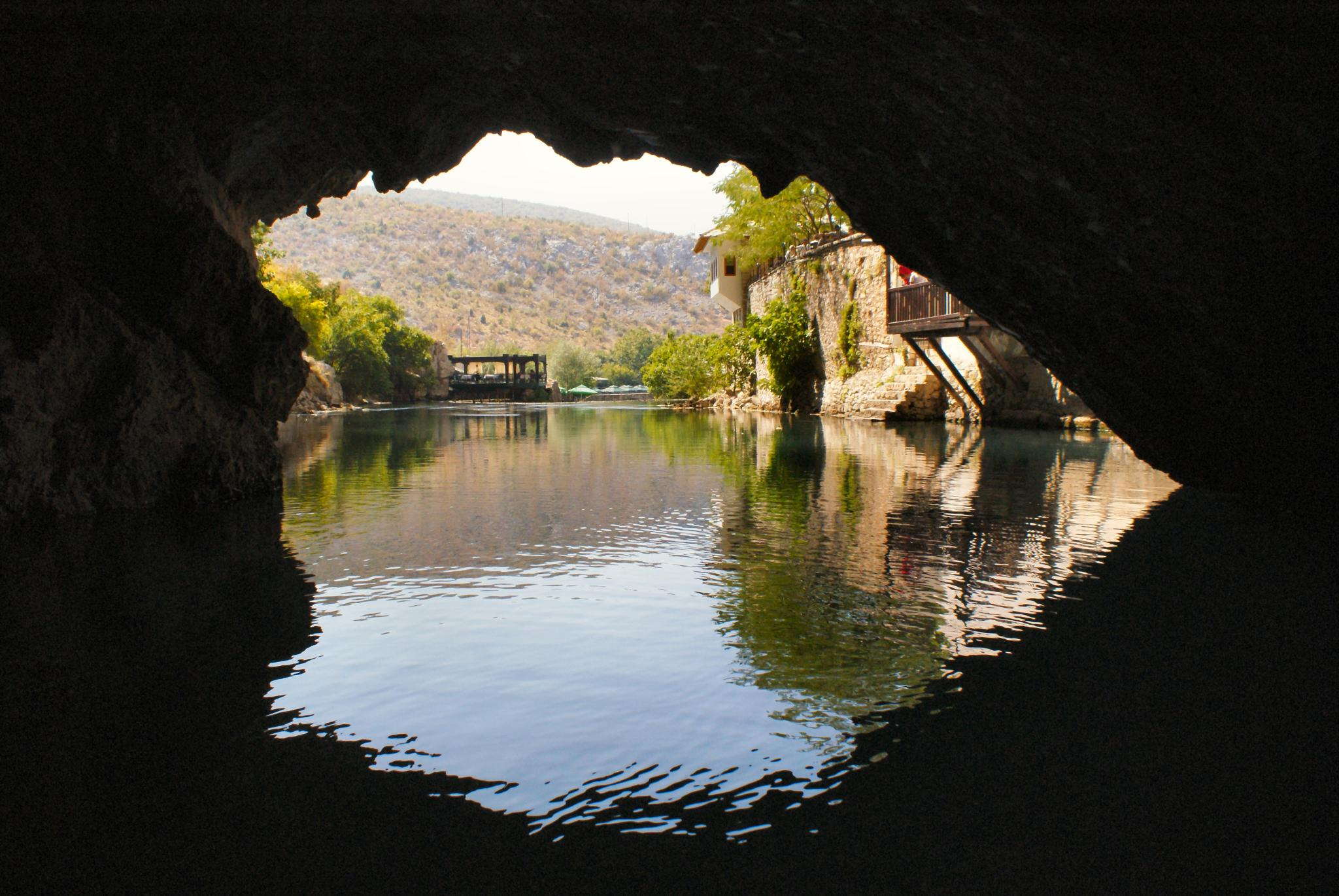 Buna 10